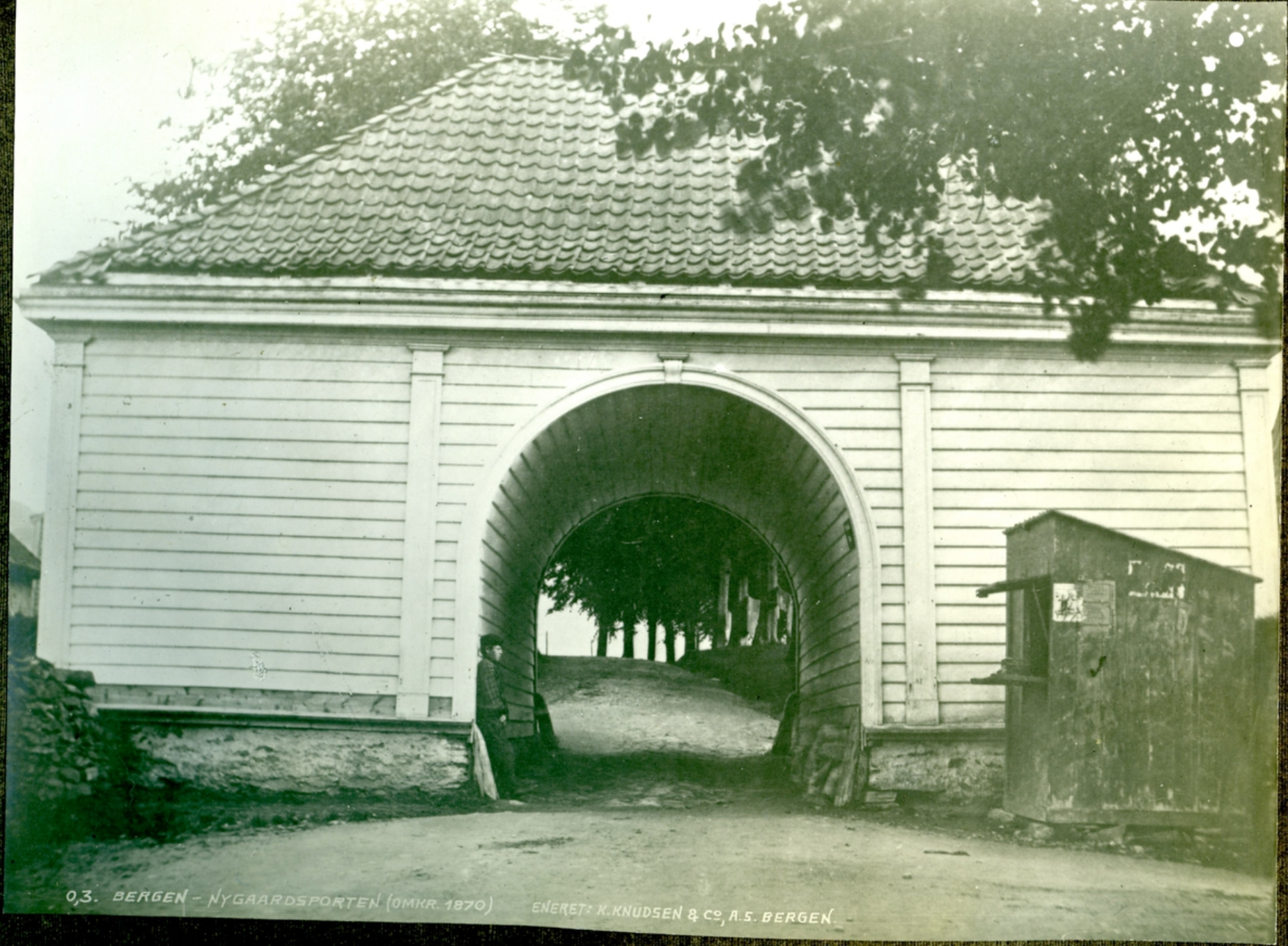 Den gamle Nygårdsporten i Bergen omkring 1870